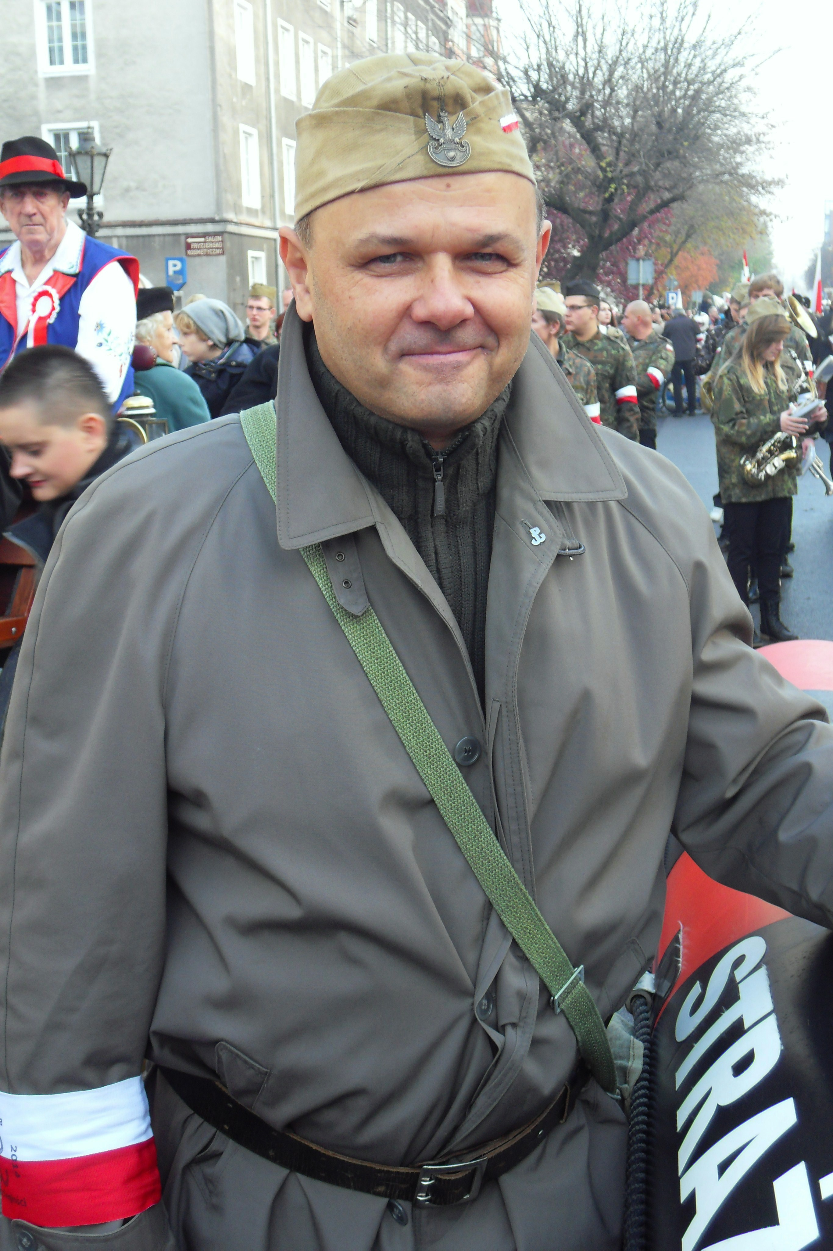 Adam Hlebowicz (gdański historyk i dziennikarz) w kostiumie podczas Parady Niepodległości 2014 w Gdańsku.